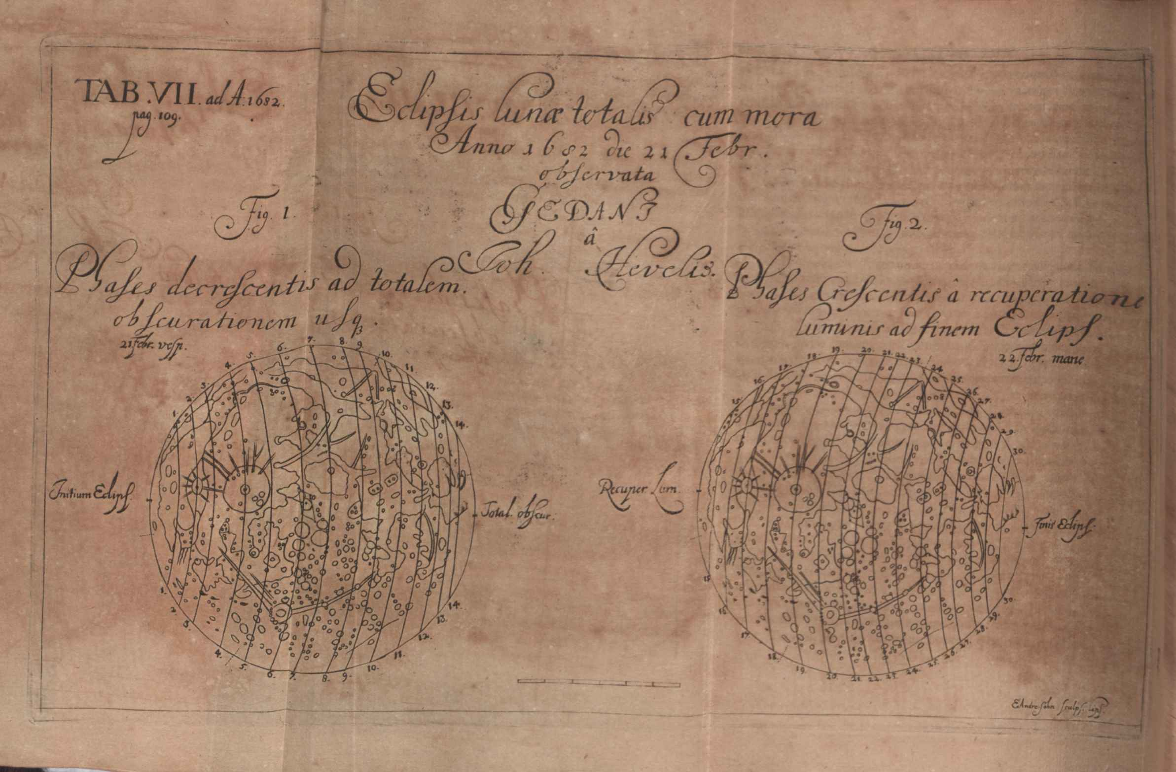 Illustration